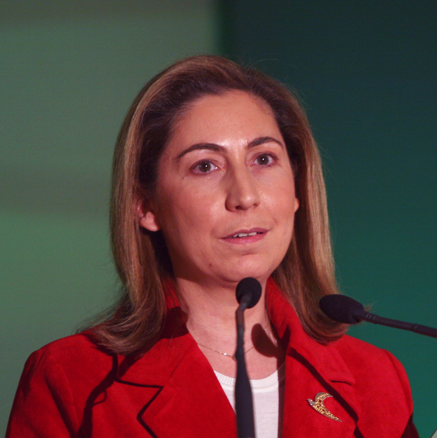 Μαριλίζα Ξενογιαννακοπούλου, Υπουργός Υγείας και Κοινωνικής Αλληλεγγύης.